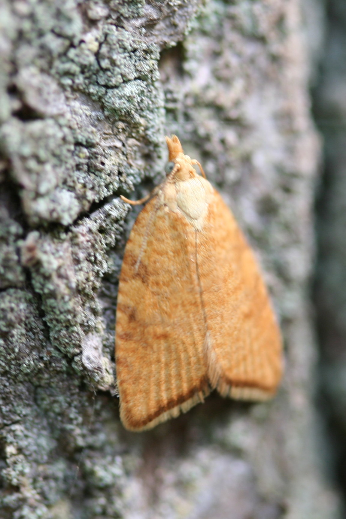 Aleimma loeflingiana